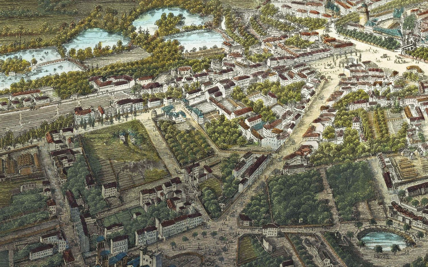 Die Leipziger Südvorstadt (Petersvorstadt) um 1850